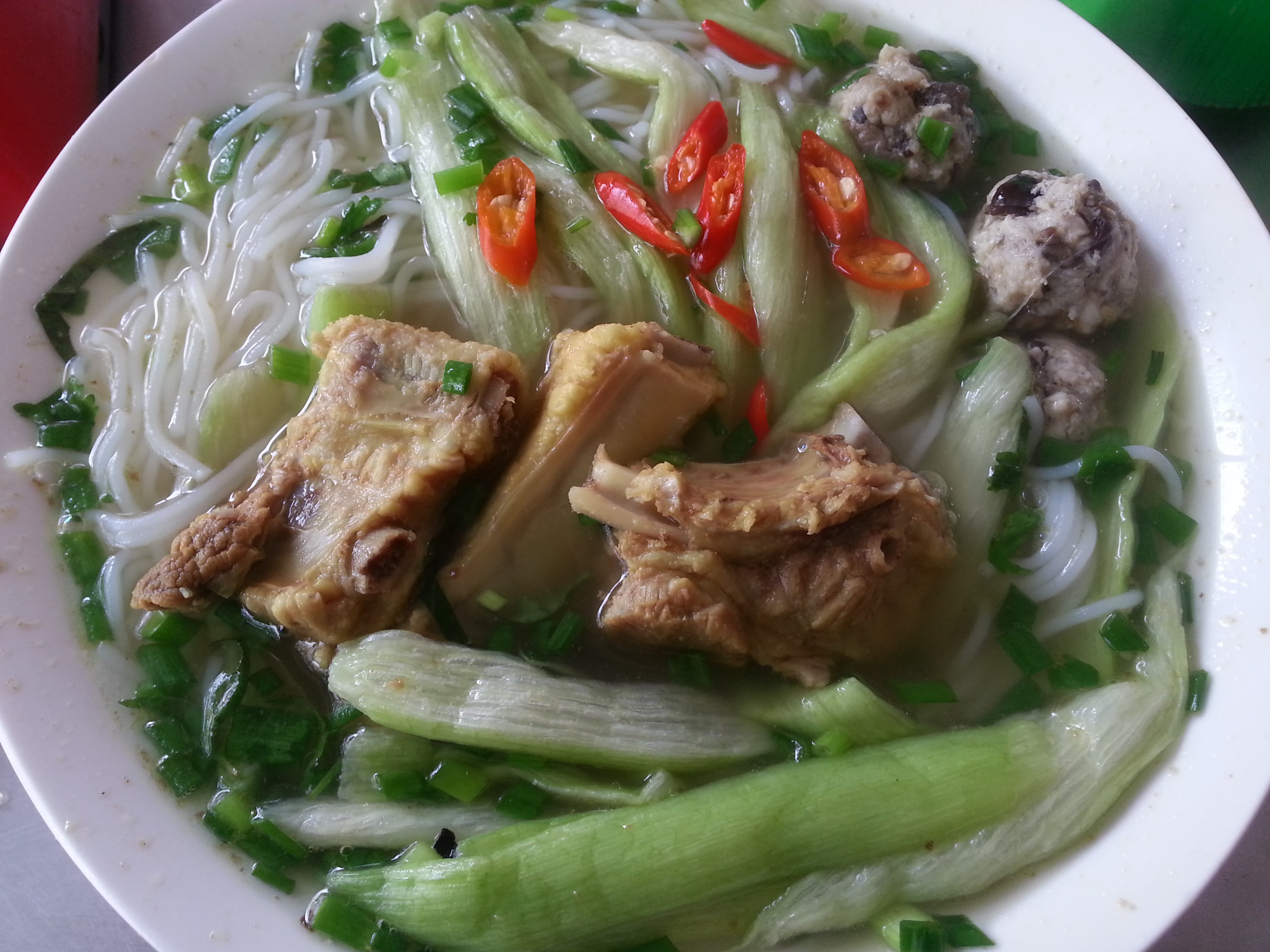 Bún mọc sườn dọc mùng